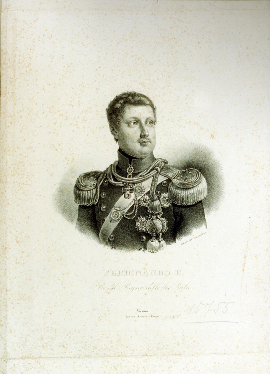 Ferdinand II. (1810-1859), König beider Sizilien. Lithographie von Josef Kriehuber, um 1835